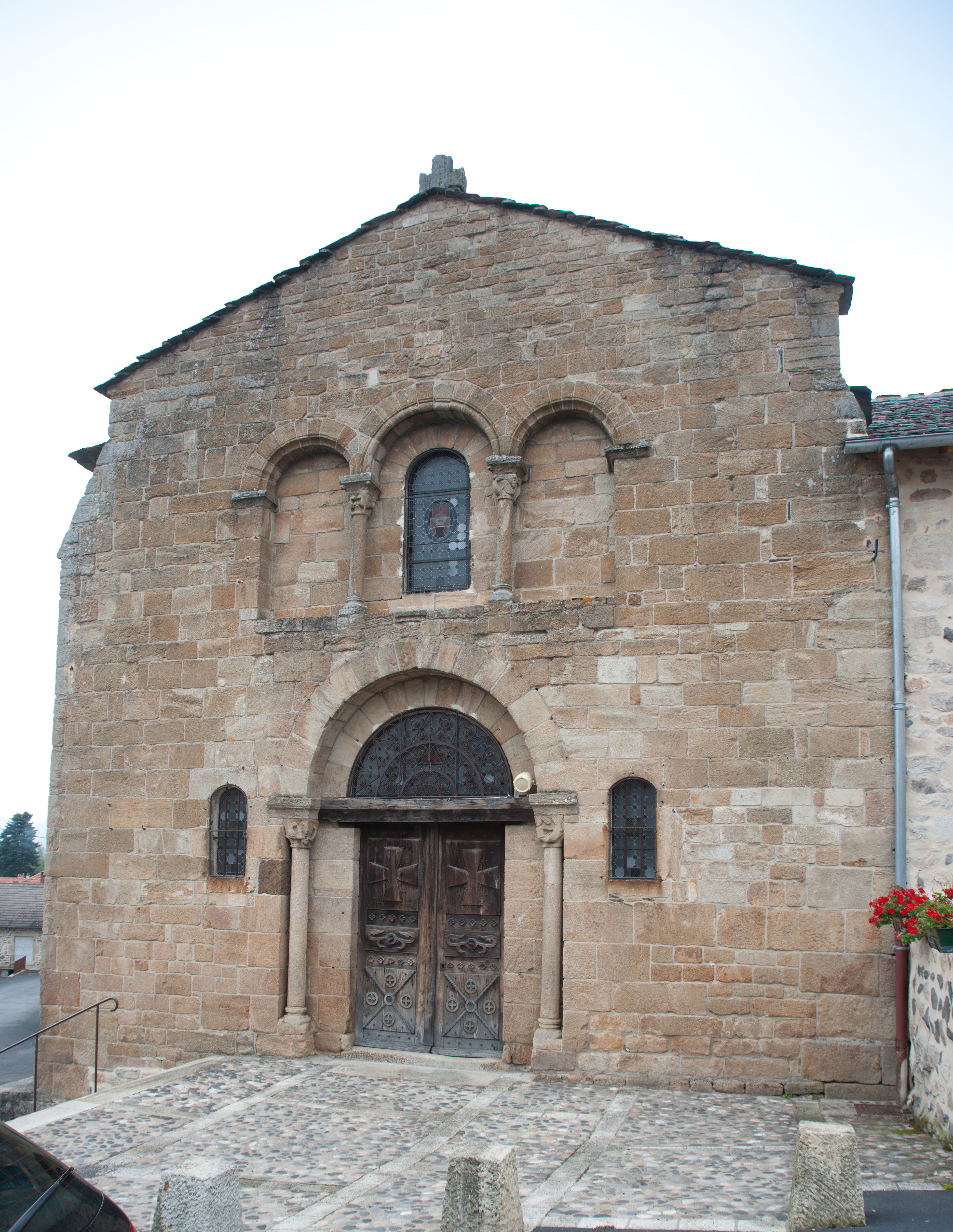 Église Saint-Étienne de Saint-Étienne-Lardeyrol